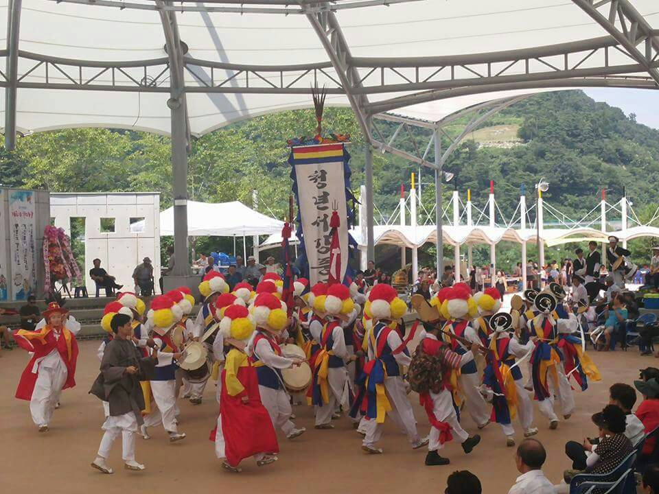 임실 필봉 농악